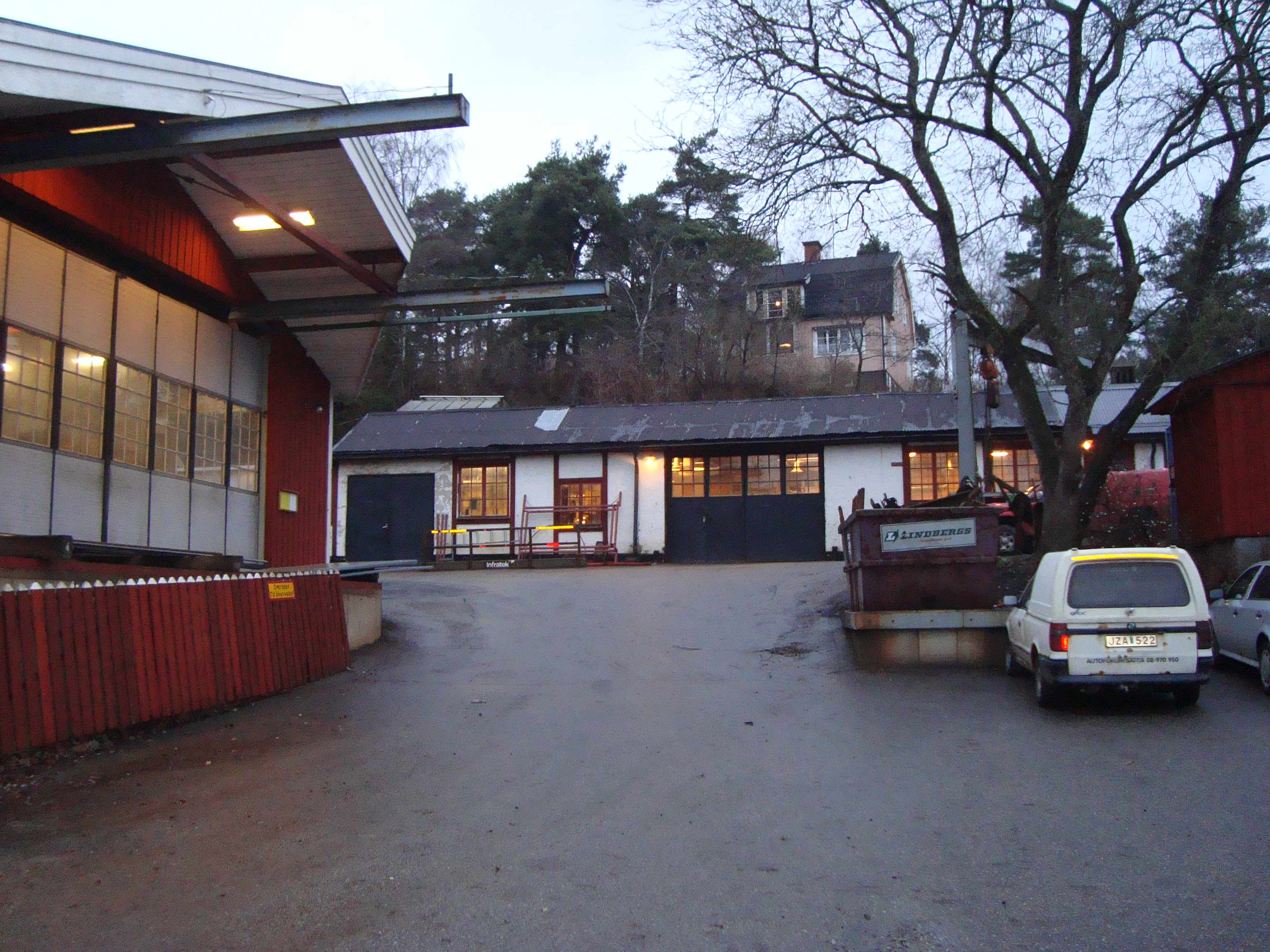 Smedjan i järna